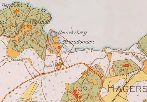 del av karta över "Äppelviken" från 1917-1933